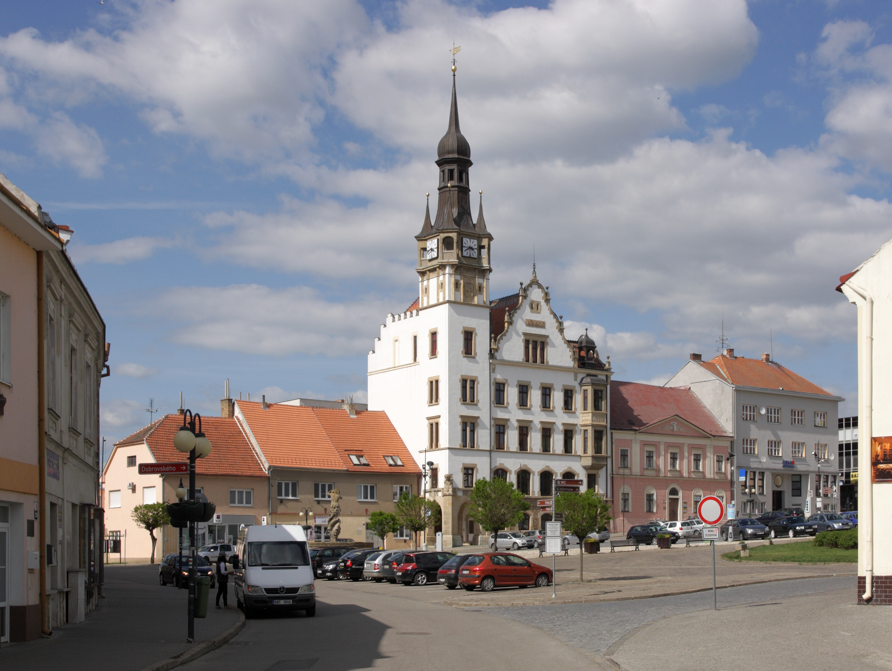 Hustopeče - Dukelské náměstí.